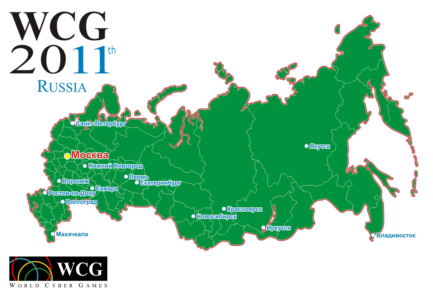 Карта региональных отборочных WCG 2011 Russia